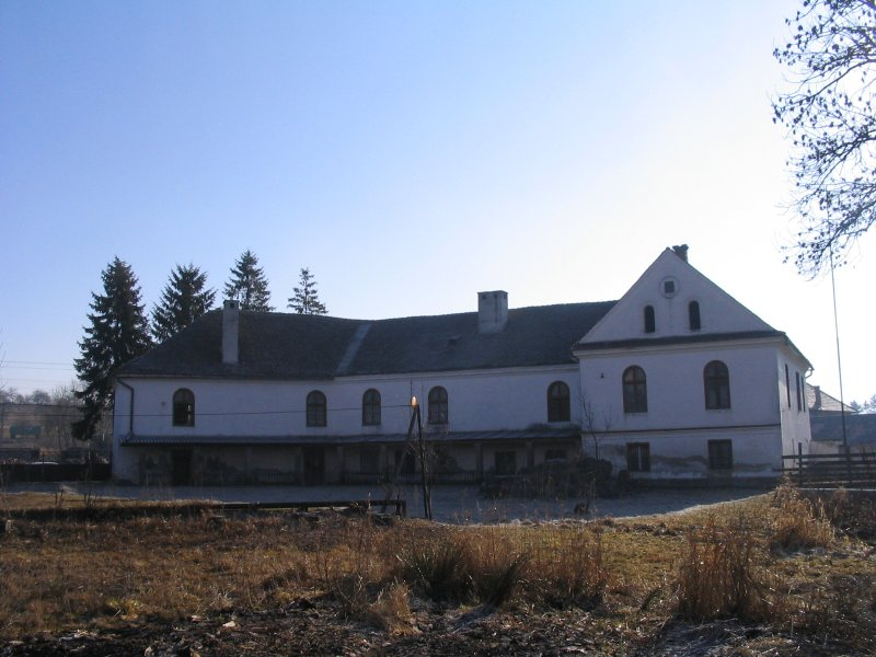 Daniel kastély, Olasztelek, 2007